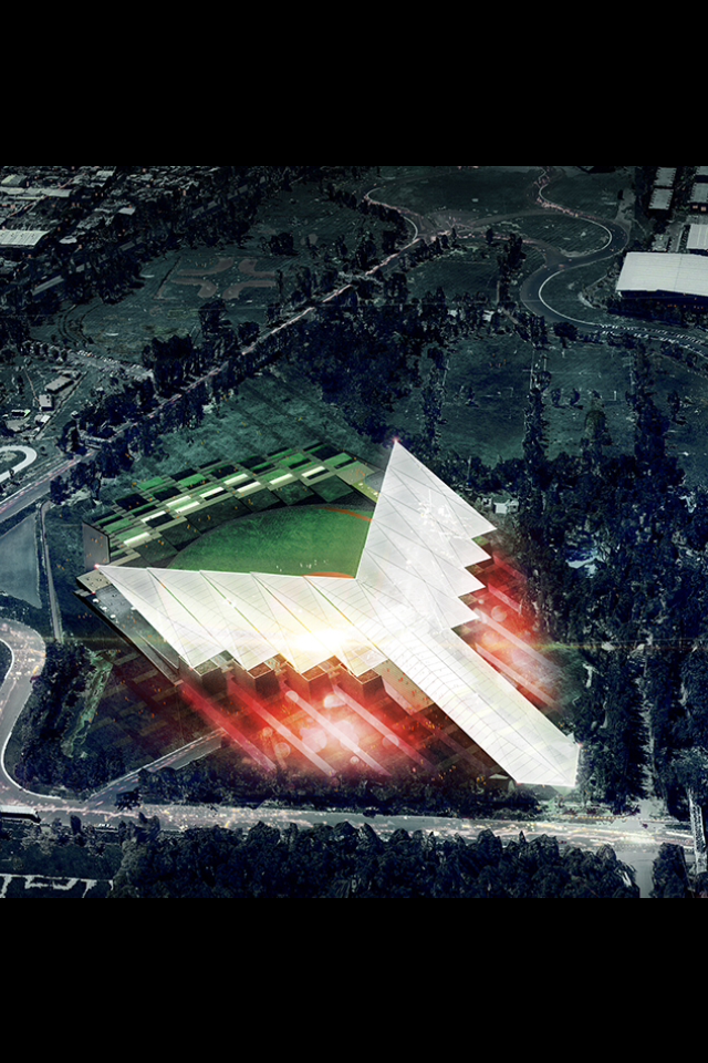 Se trata de la foto del Render del nuevo estadio de los Diablos Rojos del México diseñado por el arq. Francisco González-Pulido y Jahn